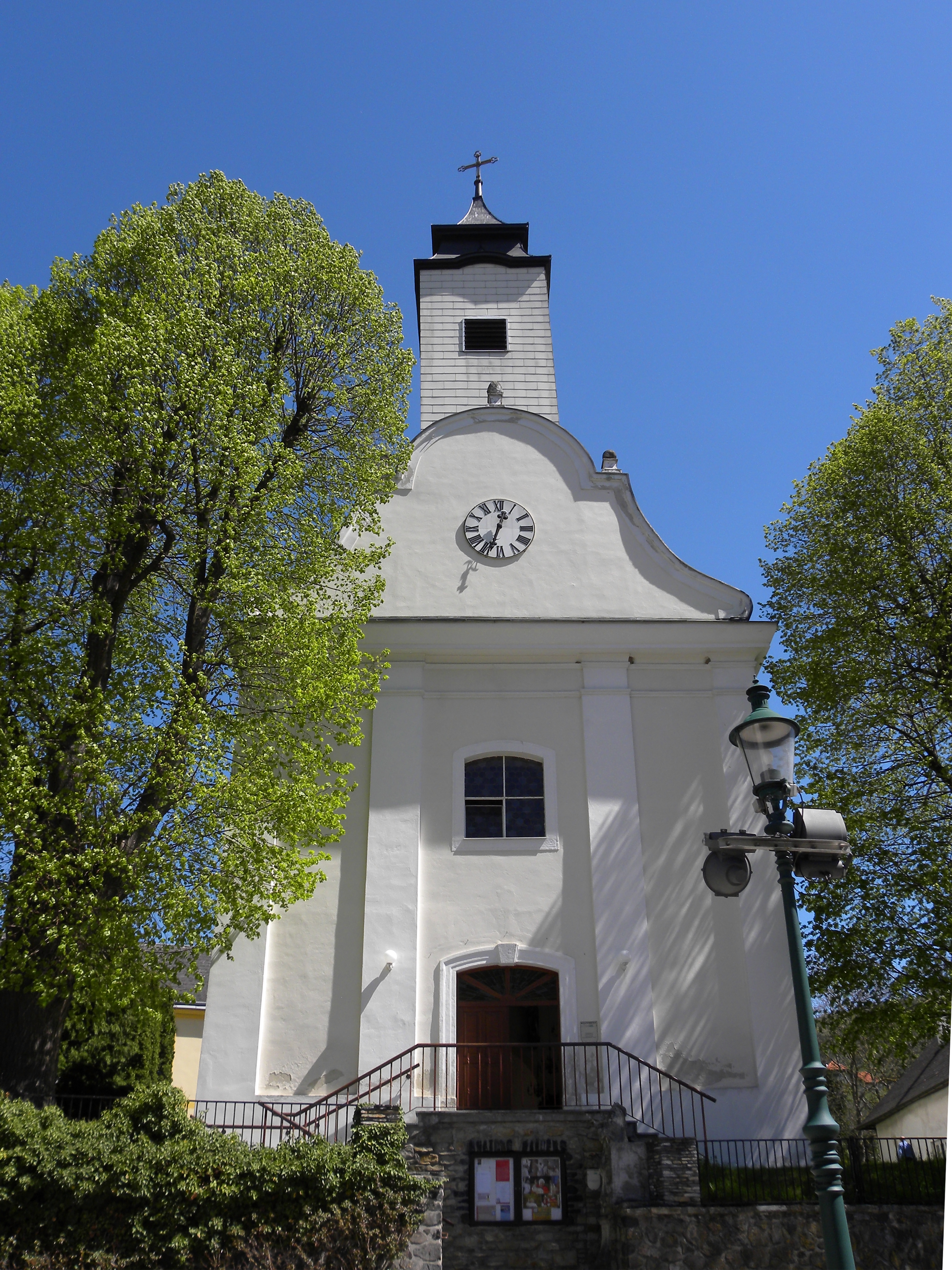 Außenansicht der katholischen Pfarrkirche Hl. Bartholomäus in Schwarzenbach, Niederösterreich.